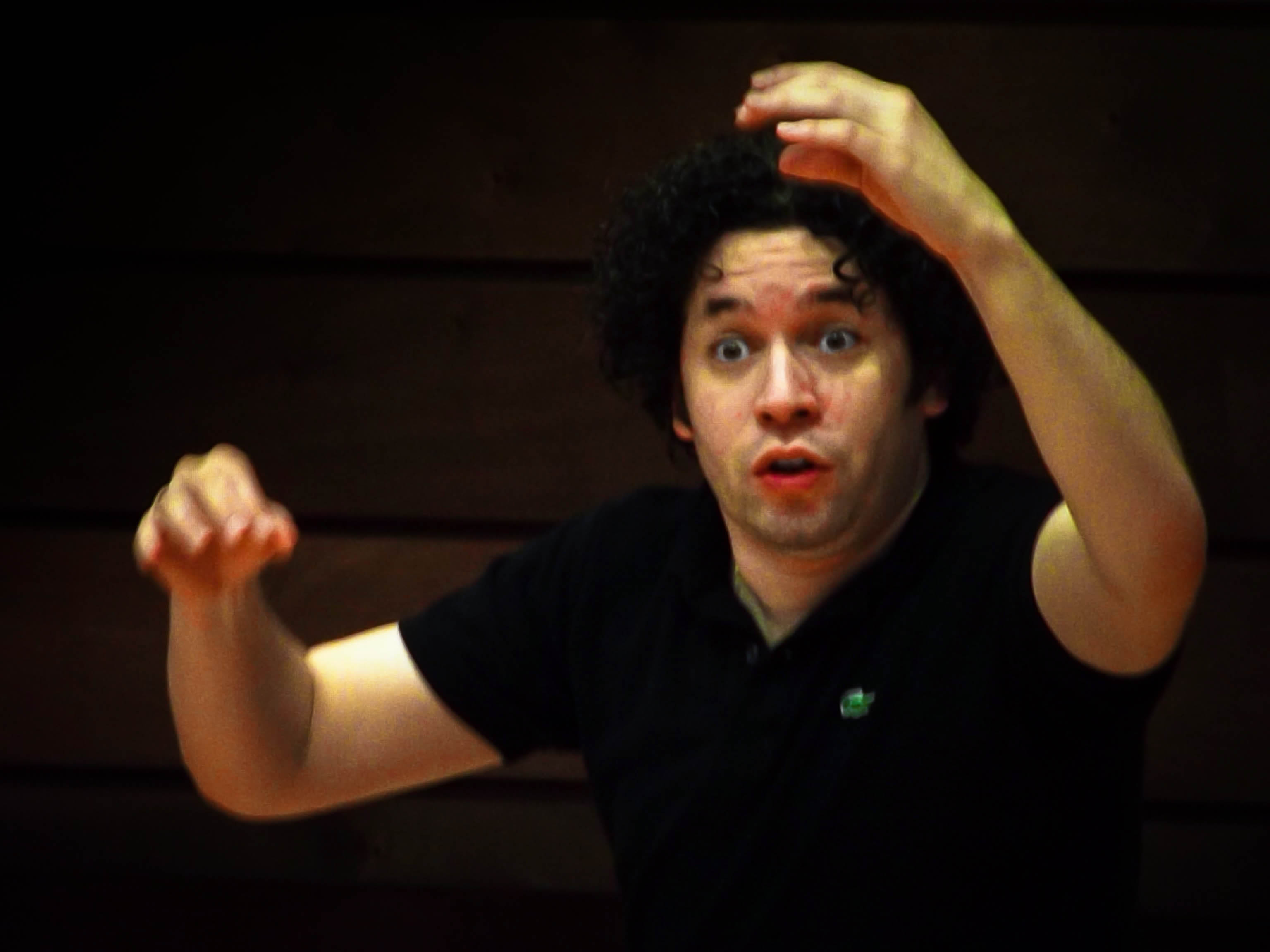 Ensayo para la 8va sinfonía de Mahler